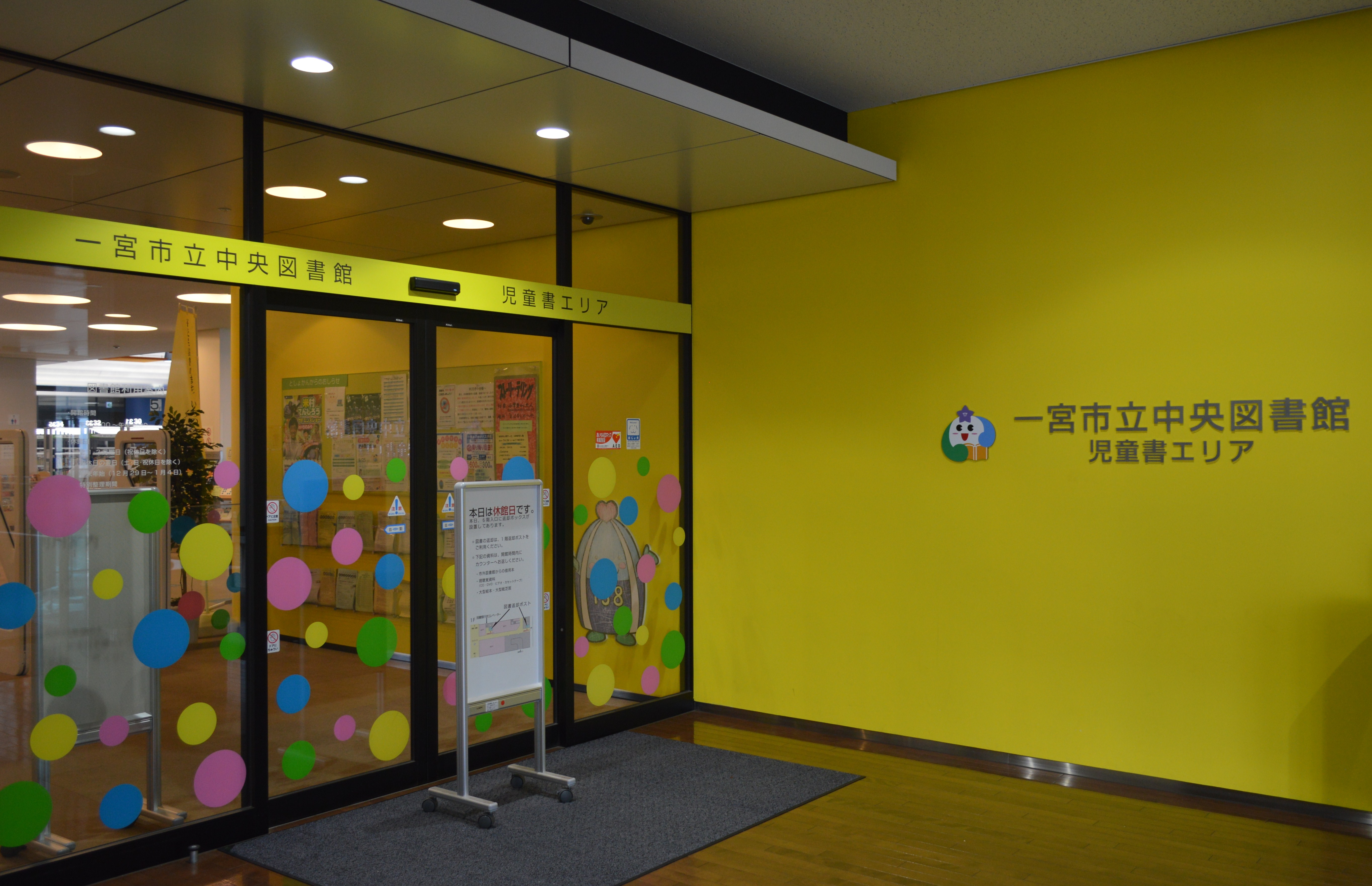 一宮市立中央図書館 5階の児童書エリア入口